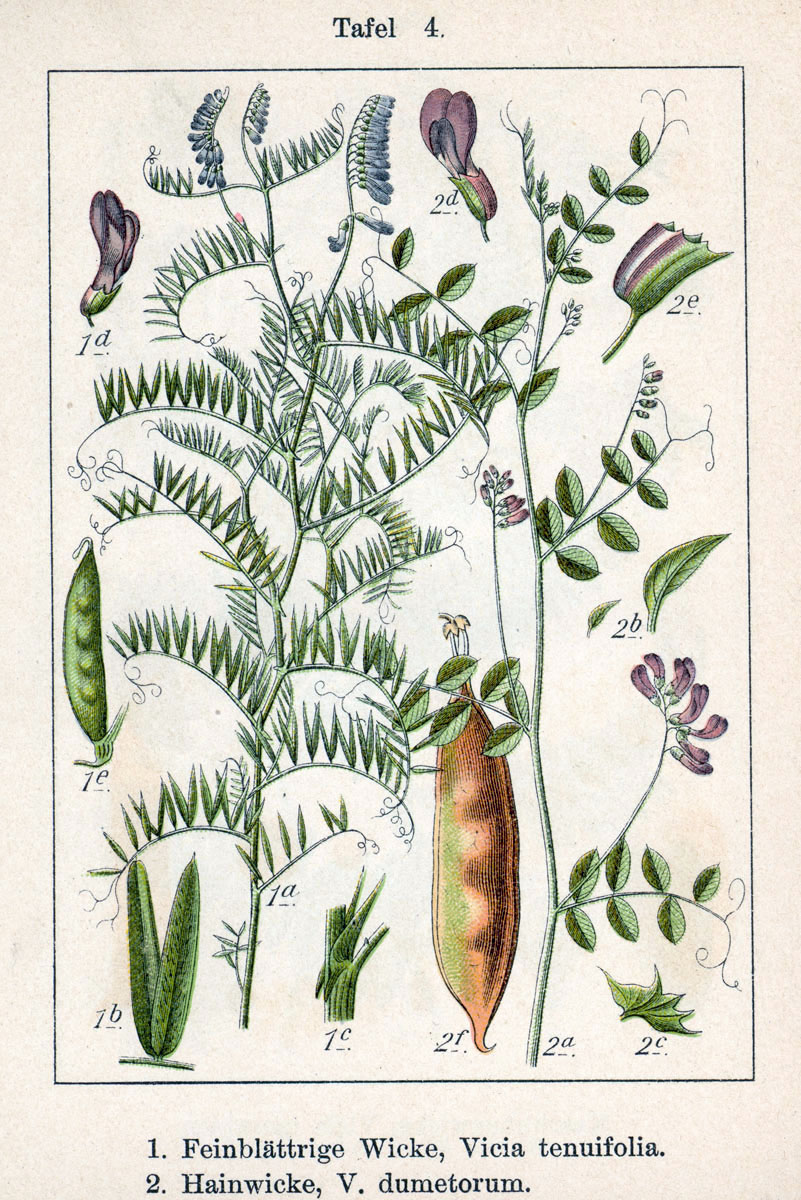 Vicia tenuifolia Roth s. str., Vicia dumetorum L. Original Description 1. Feinblättrige Wicke, Vicia tenuifolia 2. Hainwicke, Vicia dumetorum